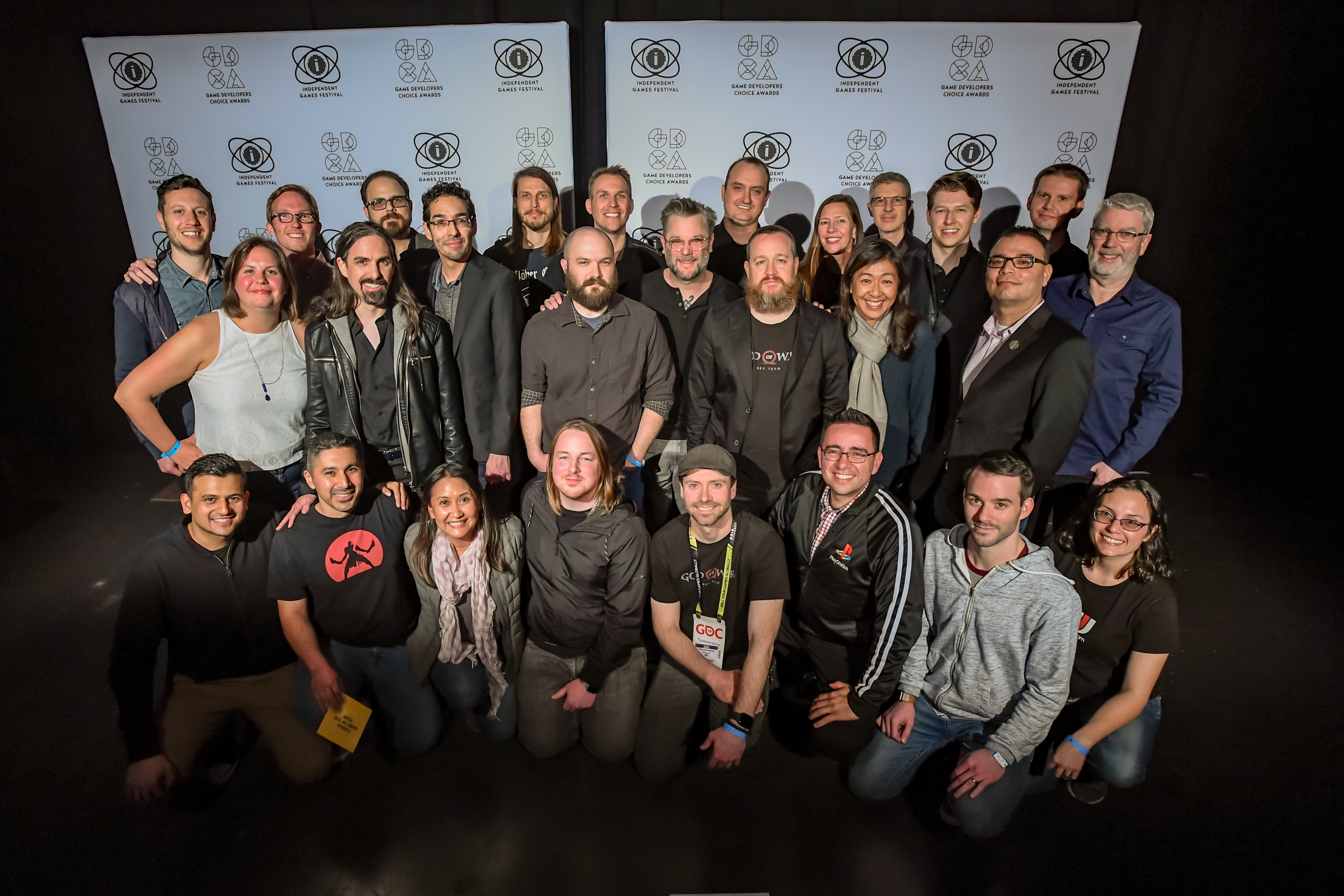 _GEN2305_1